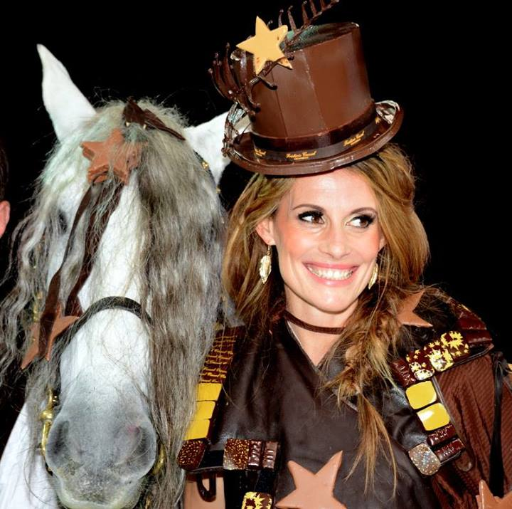 Sophie Thalmann au défilé de mode du salon du chocolat.